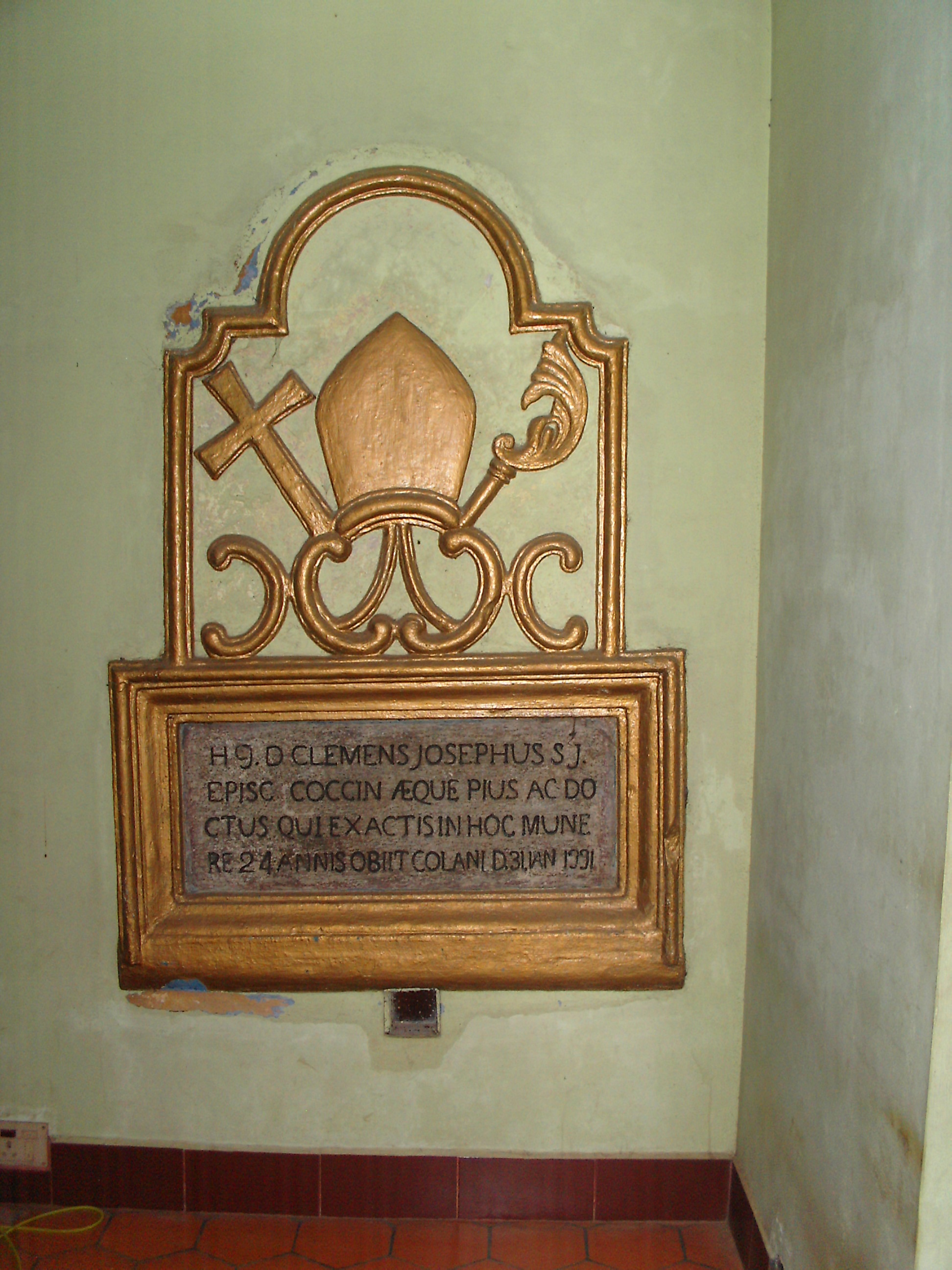 Grab von Bischof Clemens Joseph Colaco Leitao (Cochin), in Kollam, Alt-St.-Peter, Indien